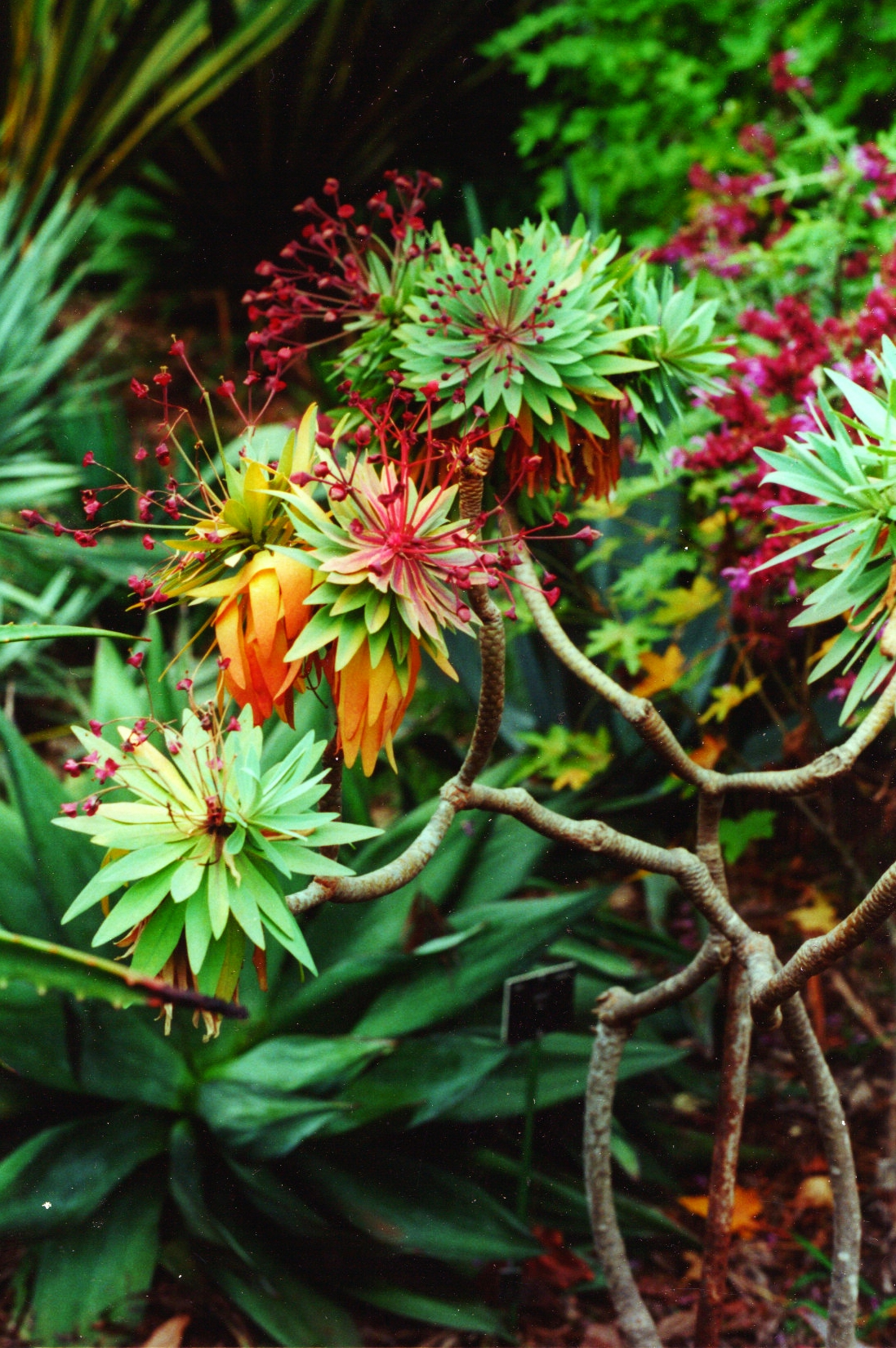 Euphorbia atropurpurea (Tabaiba majorera, Dunkelpurpurrote Wolfsmilch)